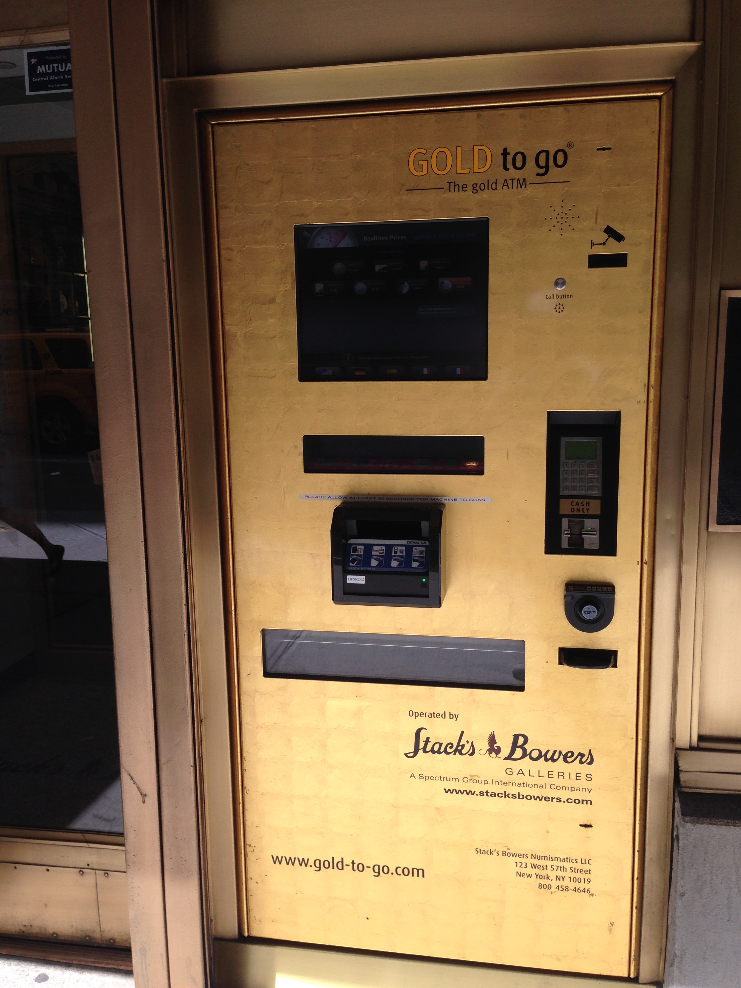 gold-vending ATM in NYC